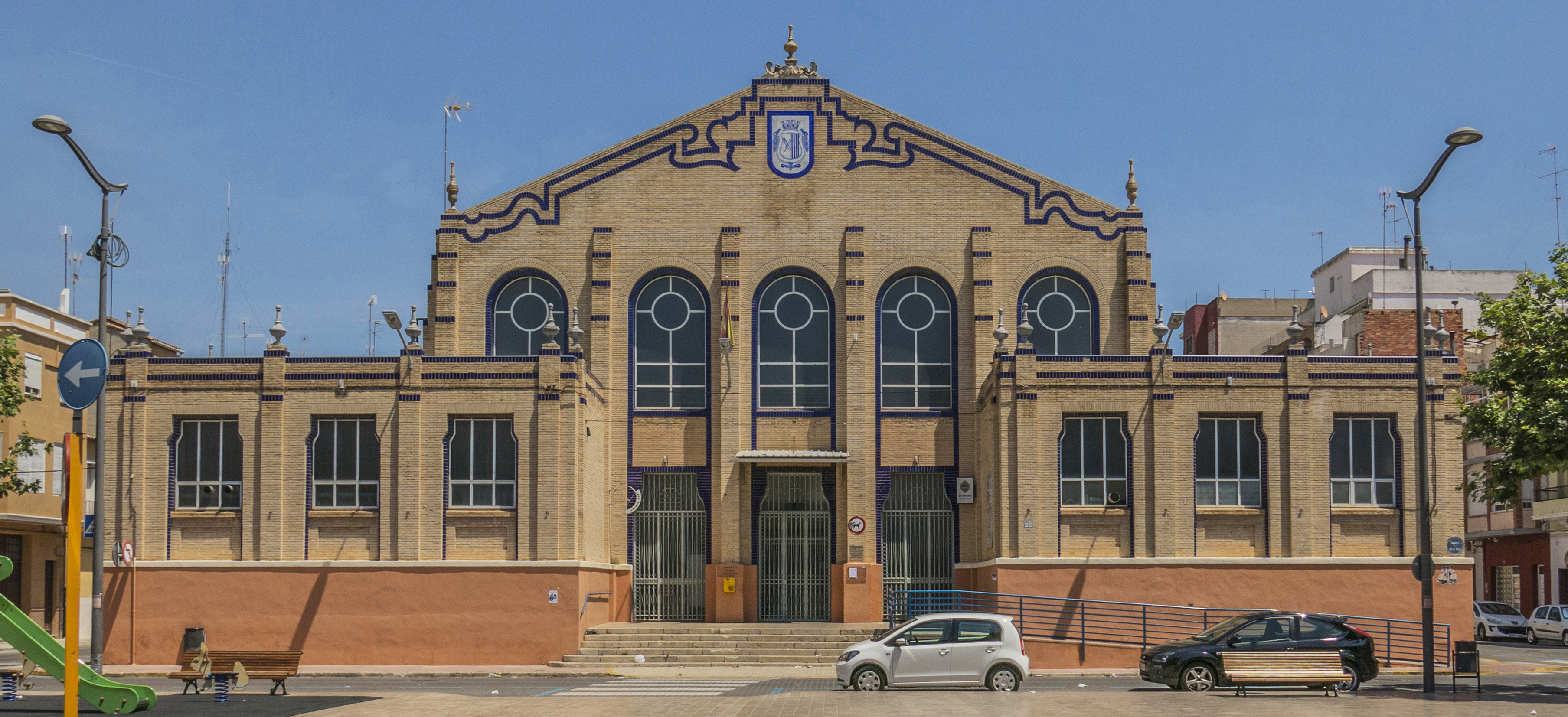 Carcaixent és una ciutat del País Valencià, que es troba a la comarca de la Ribera Alta. Aquesta imatge ha sigut publicada en: País Valencià poble a poble, Carcaixent, 19-10-2016 Enciclopèdia Catalana, Carcaixent